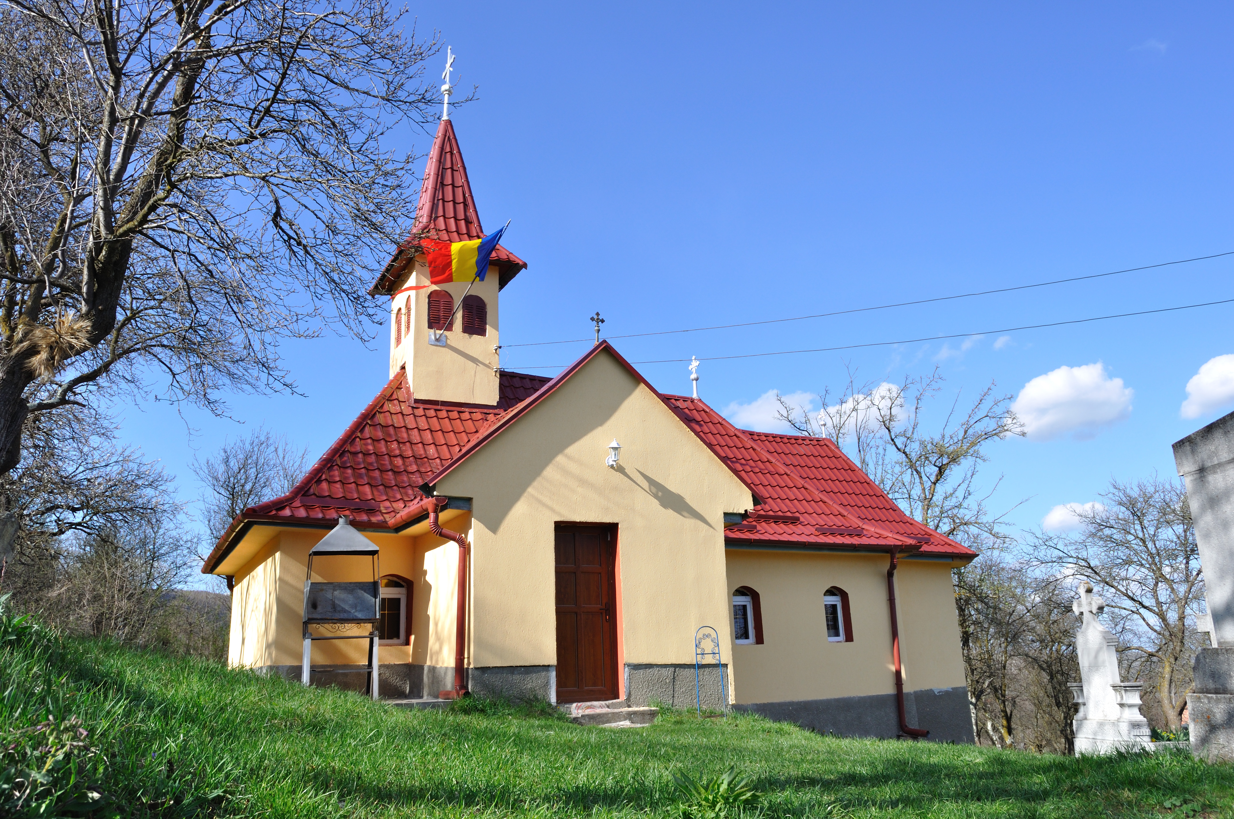 Biserica de lemn „Sfinții Arhangheli” din Moldovenești, județul Cluj